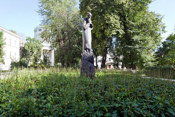 Памятник Фёдору Достоевскому во дворе Мариинской больницы, где находится музей-квартира писателя